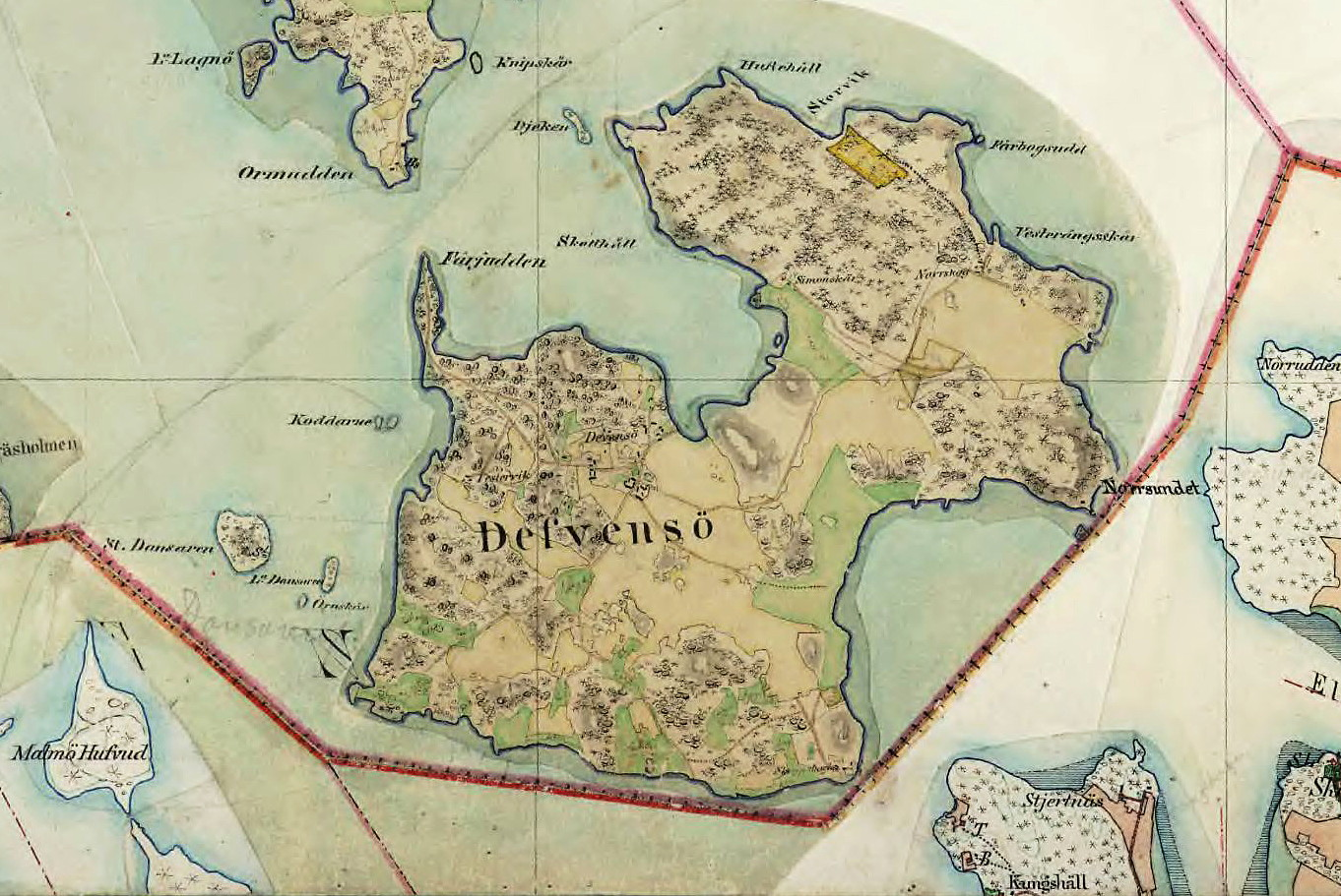 Dävensö påHäradsekonomiska kartan. Dävensö låg en tid under Ådö säteri.